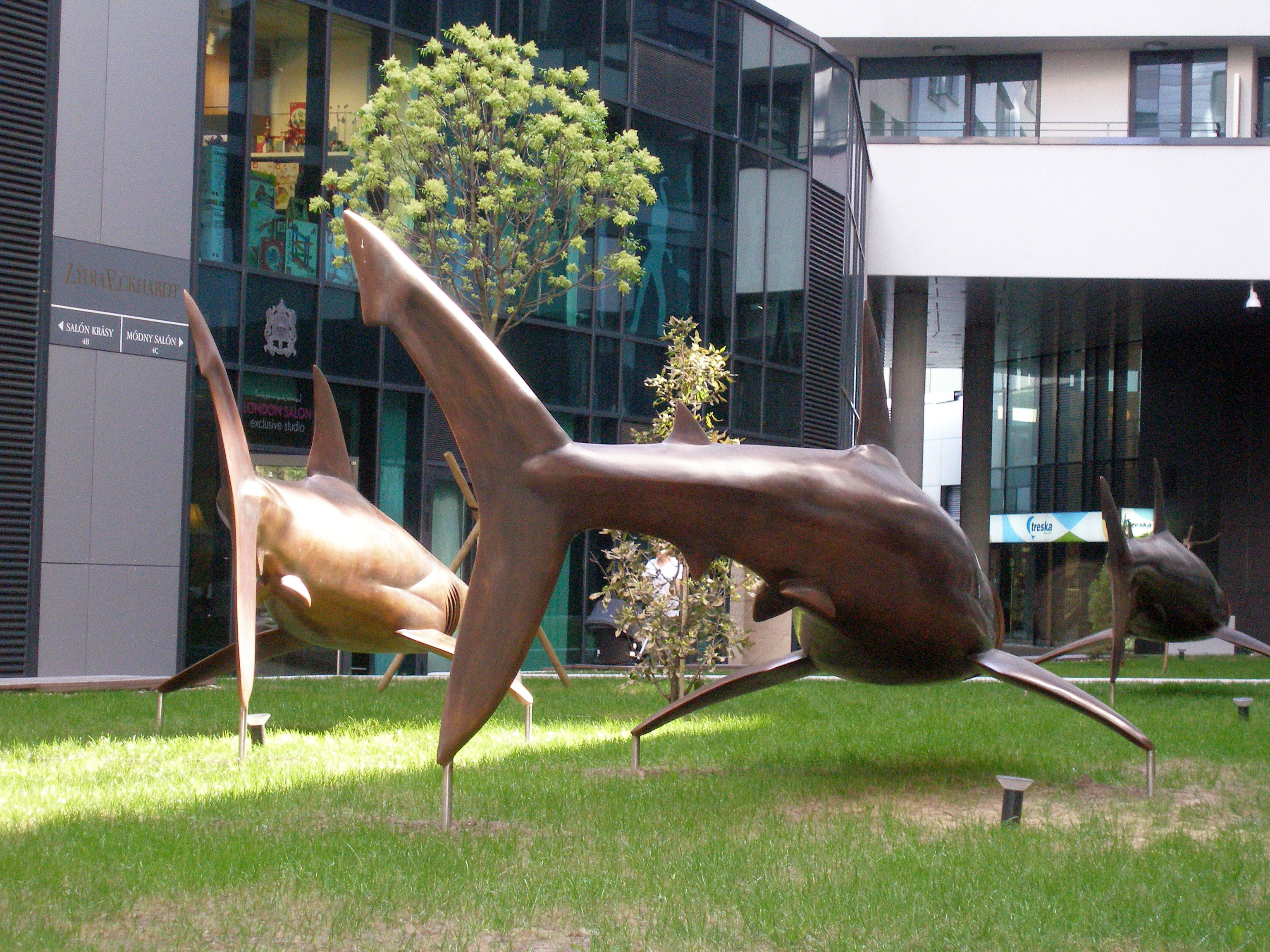 Traja bronzoví žraloci; River Park v Bratislave